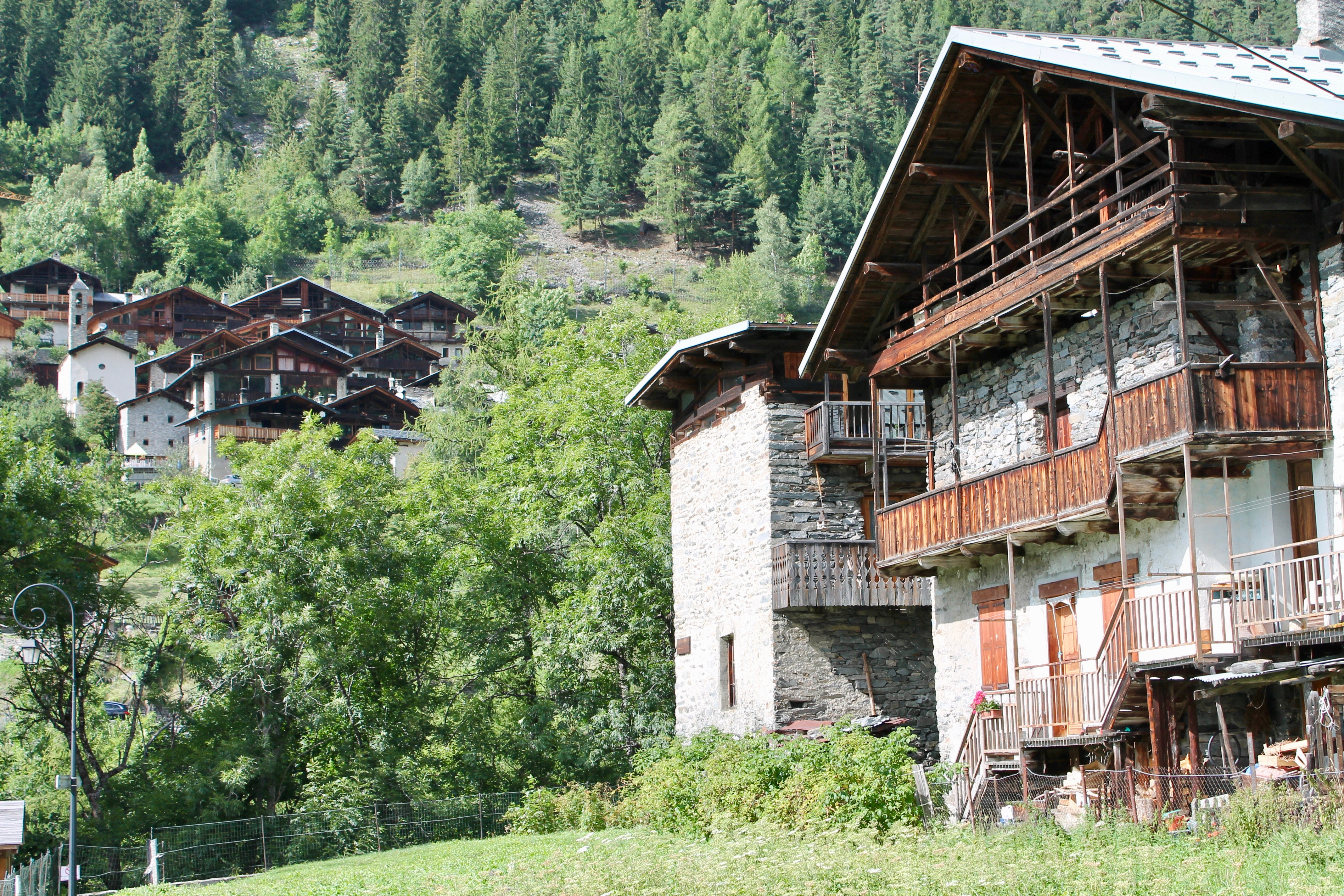 Habitat du hameau de la Mazure et au fond le hameau du Miroir et sa chapelle (Sainte-Foy-Tarentaise).